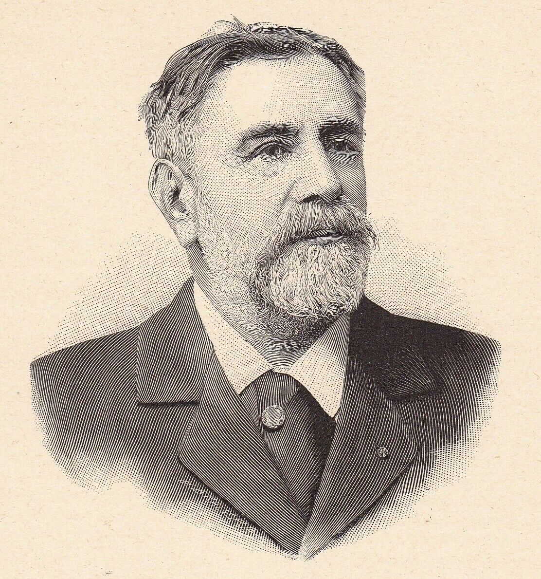 French archaeologist Georges Perrot (1832-1914)